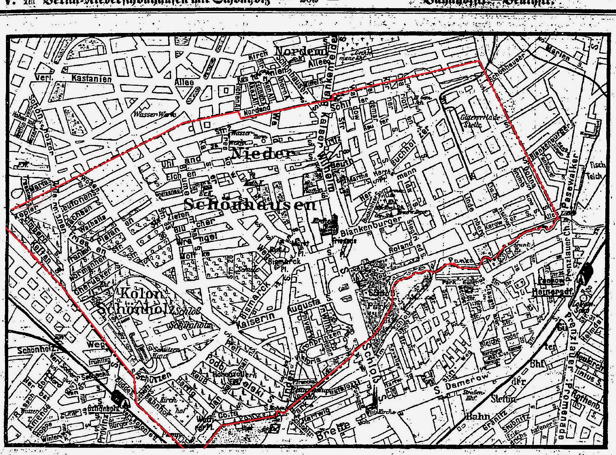 Das Straßensystem von Berlin=Niederschönhausen nach der Karte des Vorortes Niederschönhausen aus dem Berliner Adressbuch 1915. Zur besseren Kennung wurde die Ortsgrenze mit rot nachgezeichnet.